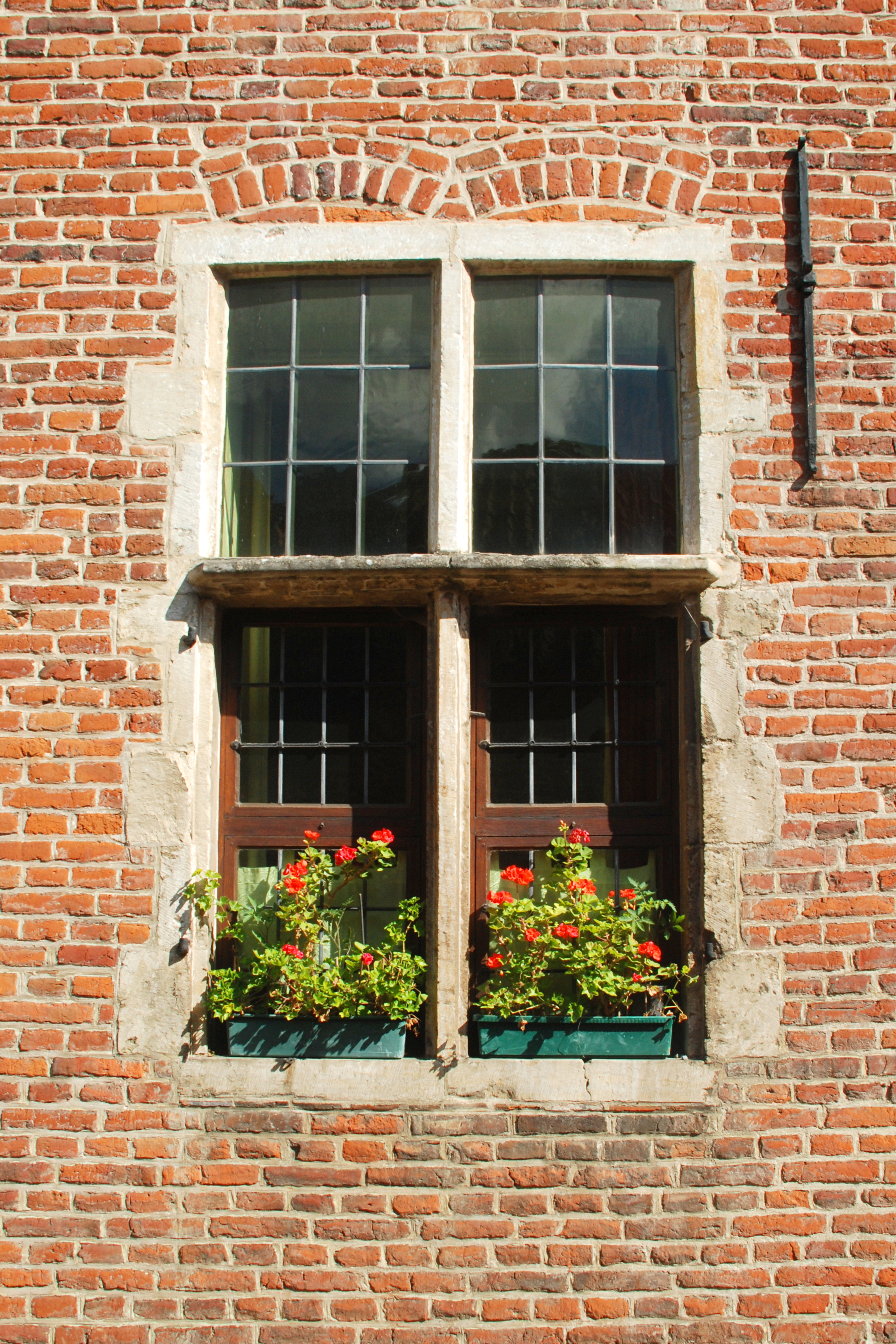 Belgium - Leuven - Groot Begijnhof - Klein Straatken n° 69 - maison « Cas van Waver »